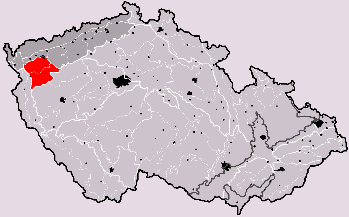 Poloha geomorfologické oblasti Slavkovský les v rámci České republiky. Hercynský systém Hercynská pohoří I Česká vysočina I3 (III) Krušnohorská subprovincie I3C (IIIC) Karlovarská vrchovina